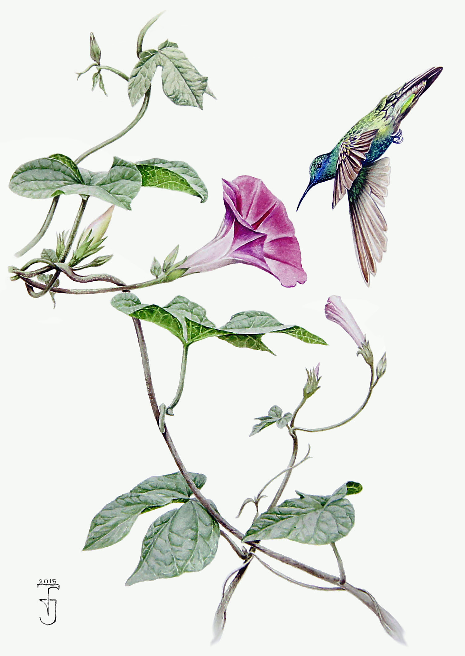 La Ipomoea es una planta trepadora o enredadera, su nombre científico es (Ipomoea purpurea) y comúnmente se le conoce con diferentes nombres tales como: Don Diego de Día, Campanilla morada o Hiedra morada. Pertenece a la familia de las Convolvuláceas, este se encuentra en América y África, crece en ambientes tropicales. Presenta como características, tallos delgados y frágiles que se acoplan al entorno en el que crece, trepando y enredándose en otras plantas, o construcciones artificiales. Su hoja presenta forma de corazón y la flor es similar a una campana que presenta varias coloraciones, pasando por el blanco, rosado, violeta o purpura. Colibrí, su nombre científico es (Colibrí coruscans) aunque también se le conoce como Colibrí Rutilante, es un ave apodiforme, nectarívora, se le encuentra en América del sur. Presenta una coloración vistosa como el verde brillante, azul y violeta en el plumaje de su tronco, sus alas marrón y verde y poseen un pico largo y delgado.